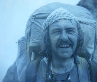 Obidenko in campaign